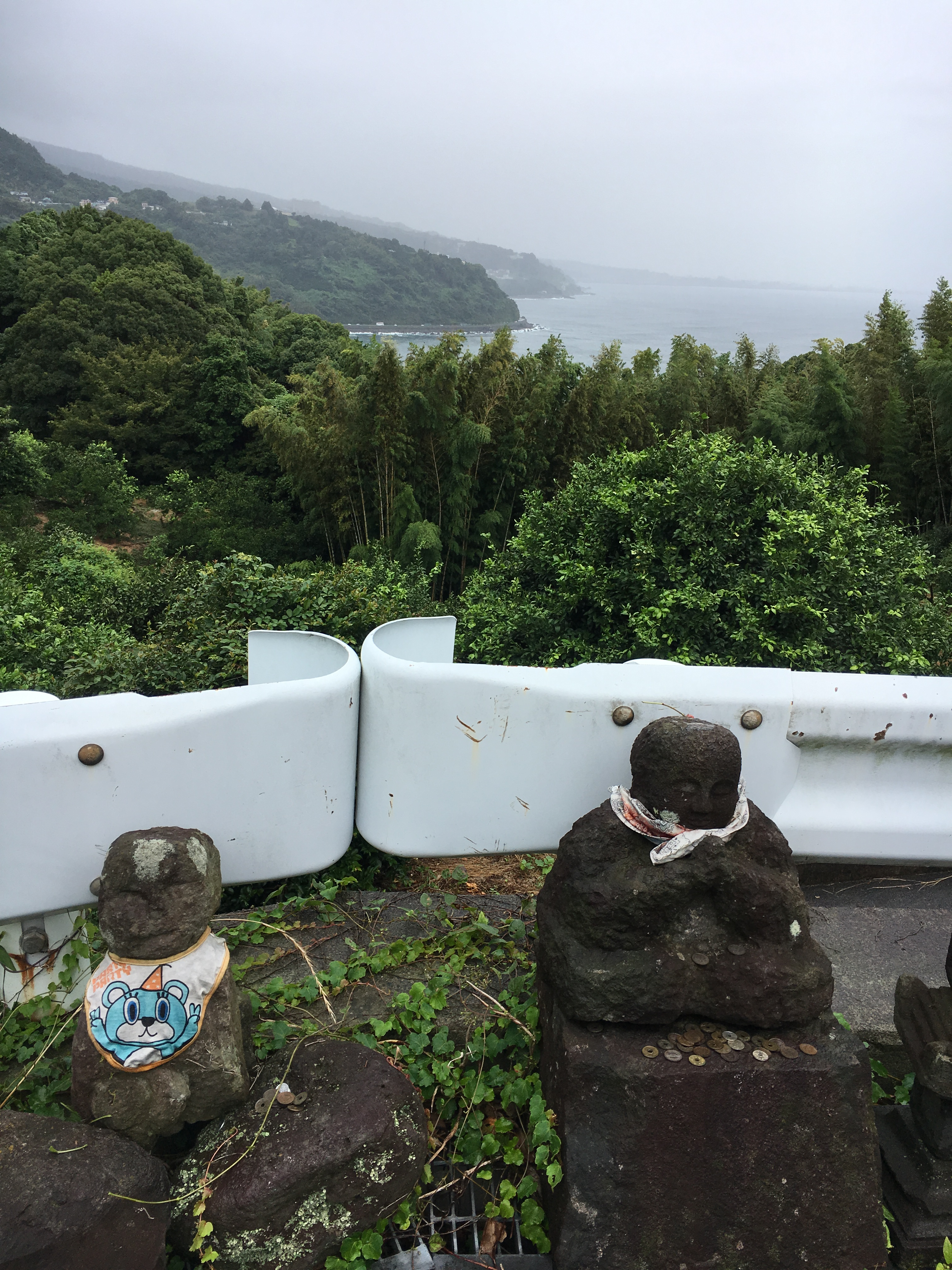 松本山の道祖神